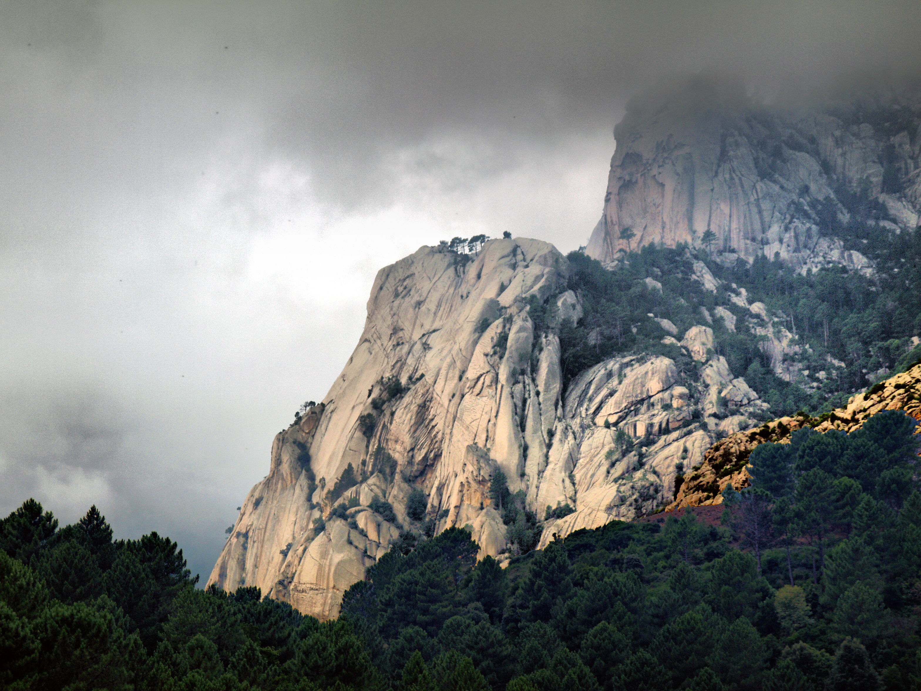 Quenza, Alta Rocca (Corse) - Au pied des Aiguilles de Bavella, sur la RD 268